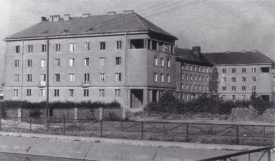 DS "Mrowisko" w latach 60. XX wieku